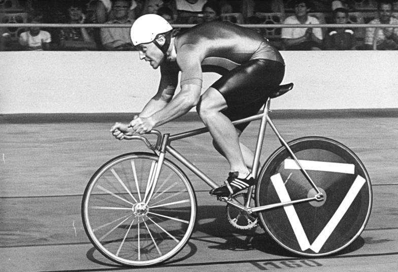 Maik Malchow ADN-ZB Weisflog 7.7.88 Cottbus: DDR-Meisterschaften im Bahnradsport - Exweltmeister Maic Malchow gewann mit 1:05,311 Minuten auf der 1.000-Meter-Zeitfahrstrecke seinen vierten DDR-Meistertitel.